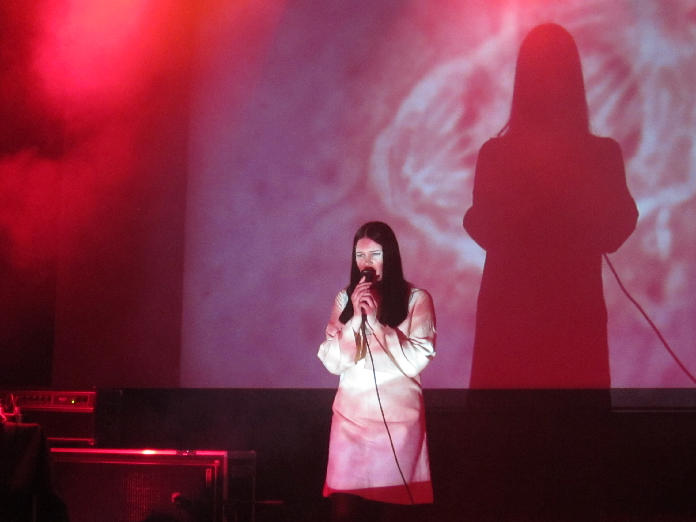 Sónar Galicia Corunha 17-19 Jun 2010